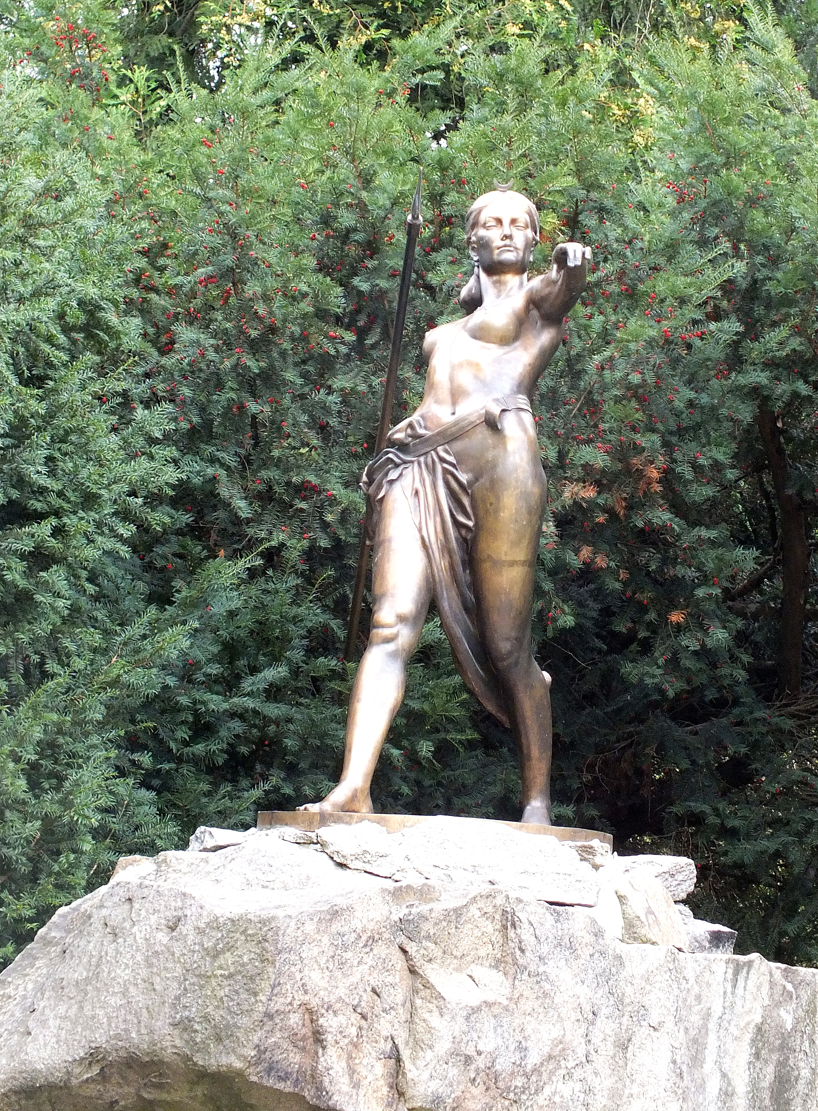 Pomnik Diany - Grupa Diany (Dianegruppe) autorstwa rzeźbiarza Ernsta Segera odsłonięto w sierpniu 1898 roku. Zniknęła po wojnie. Rekonstrukcji pomnika podjęli się wspólnie Towarzystwo Miłośników Wrocławia, Polski Związek Łowiecki i miasto Wrocław. Swój wkład mieli także mieszkańcy, którzy wsparli projekt dobrowolnymi datkami. Rzeźbiarz Ryszard Zarycki podjął się rekonstrukcji pomnika. Pomnik odsłonięto 10 września 2015 r.